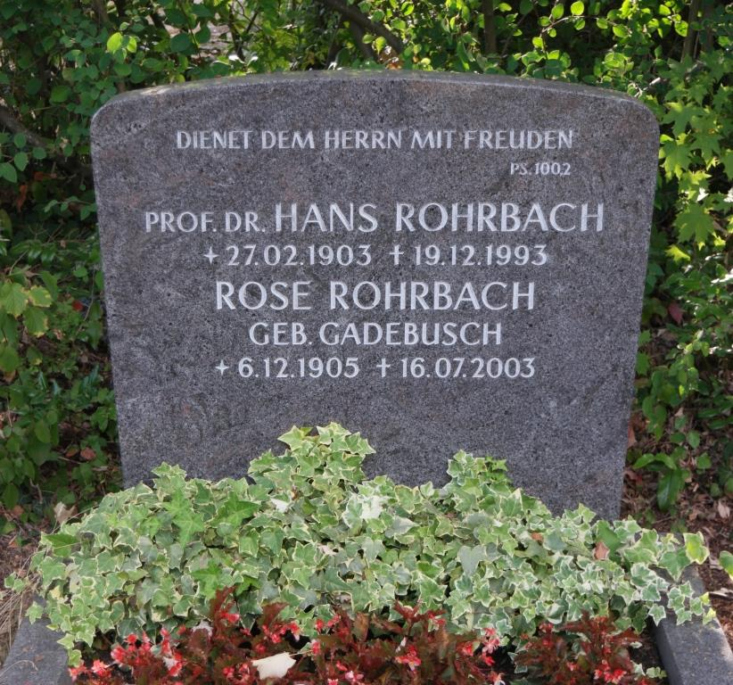 Grab des Mathematikers Hans Rohrbach, 1903-1993, auf dem Hauptfriedhof Mainz